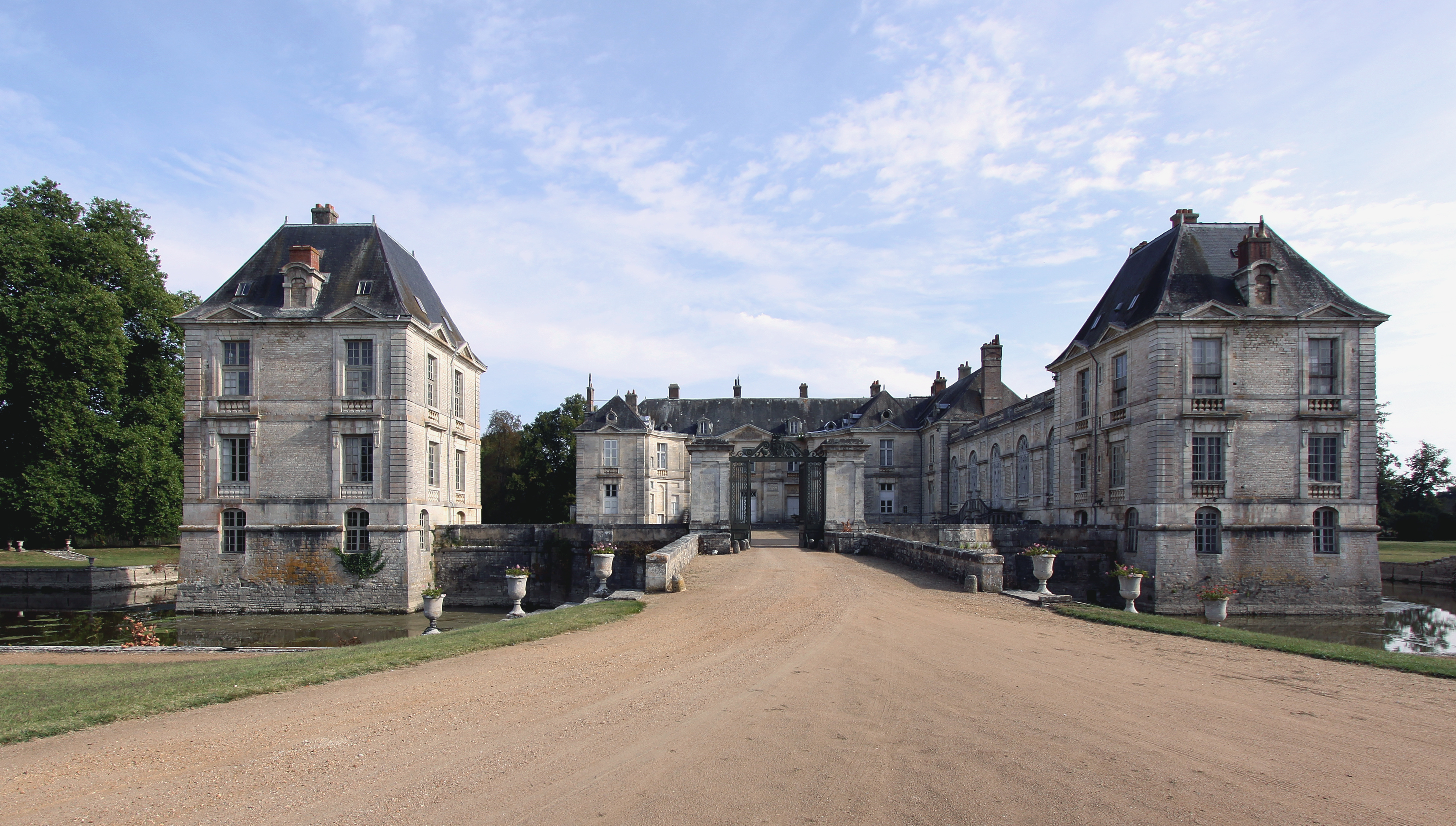 Schloss Lignières in der französischen Gemeinde Lignières im Département Cher - Zufahrt zu Ehrenhof